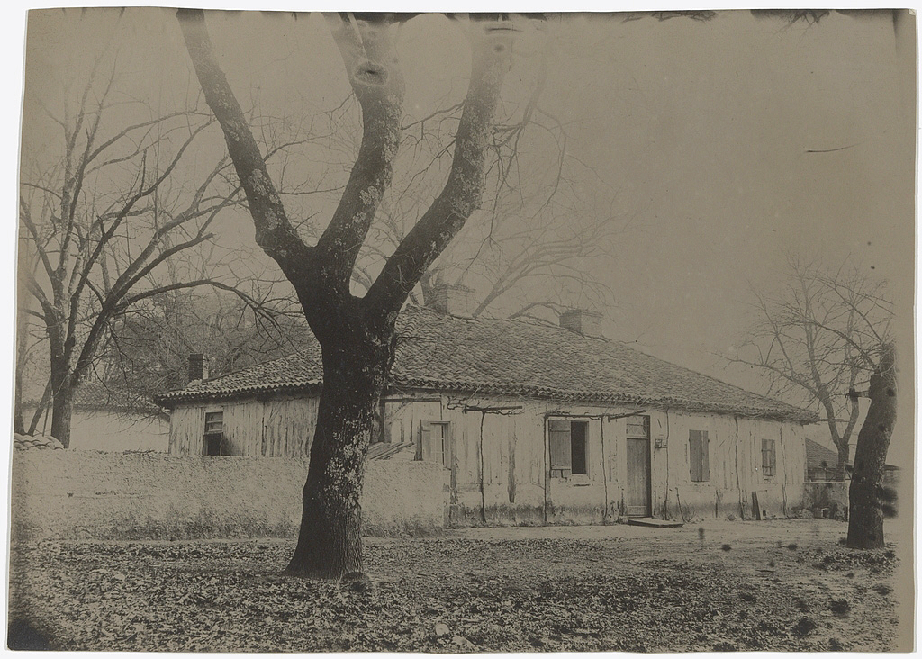 Reproduction numérique d'un tirage positif argentique de Félix Arnaudin figurant l'ancienne maison du photographe (12 x 16,6 cm).